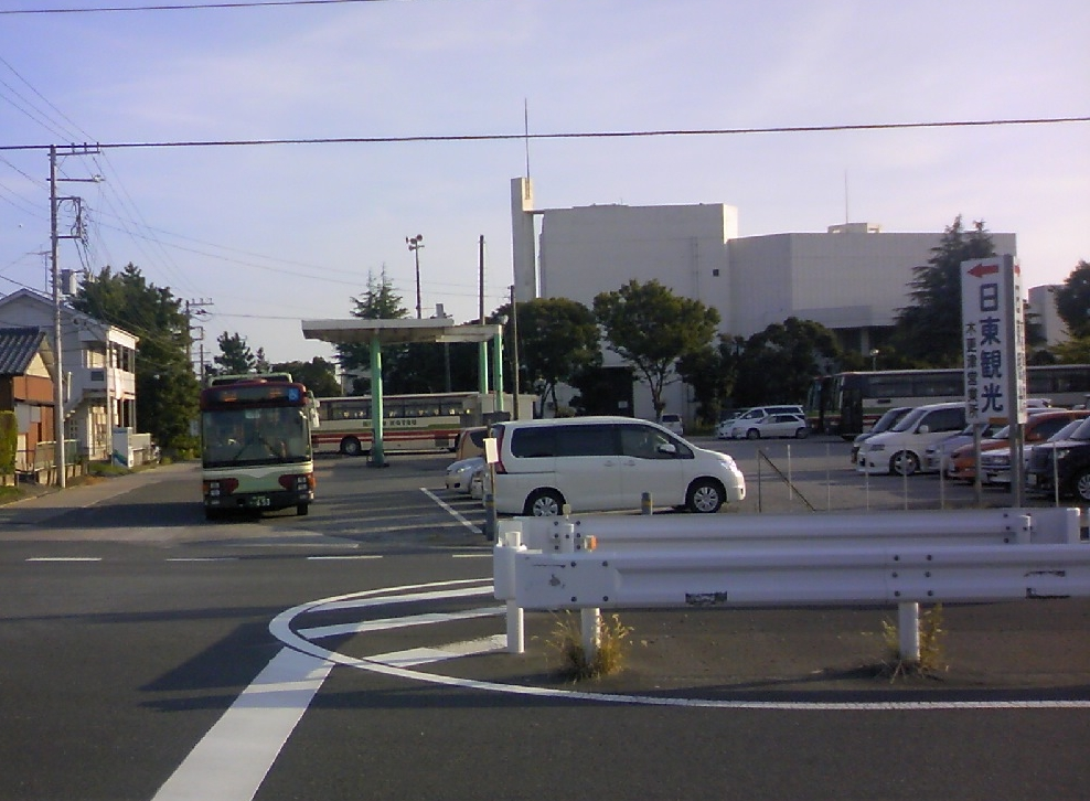 日東交通木更津運輸営業所